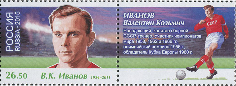 Чемпионат мира по футболу FIFA 2018 в России. Легенды футбола.В.К. Иванов (1934-2011)